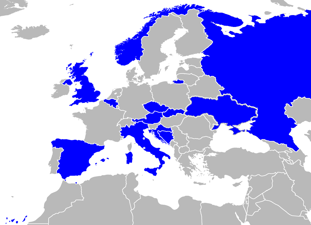 Iveco LMV operators